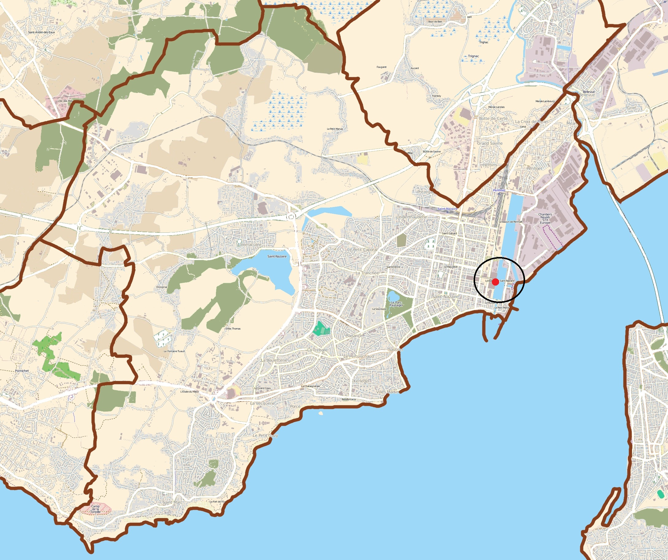 Mapa modificado de su imagen original que destaca el lugar donde se encuentra la antigua base de submarinos de Saint-Nazaire